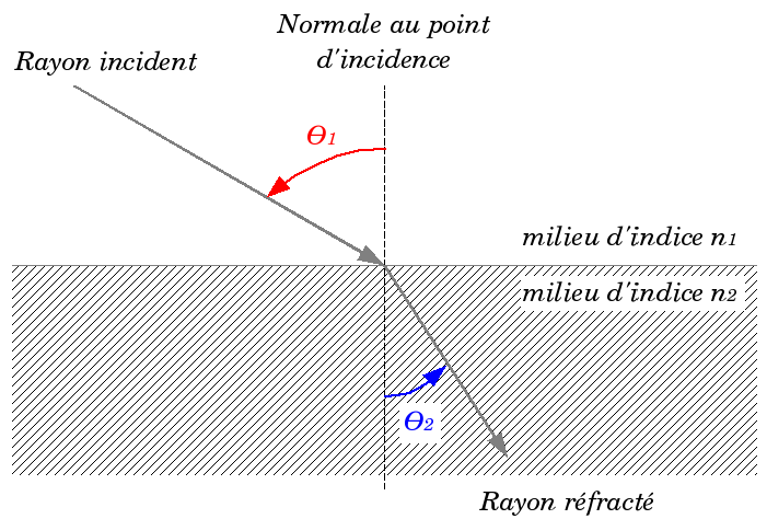 Schéma expliquant la réfraction avec légende en français